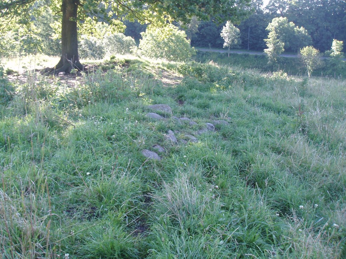 Stensætning på Ørkildborgen i Svendborg